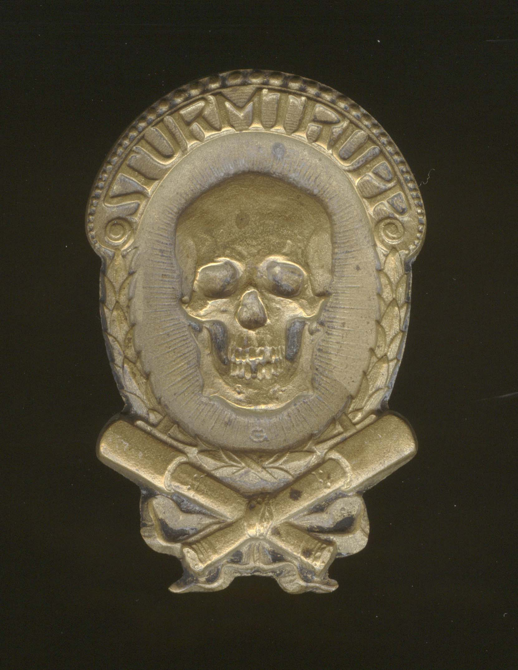 Kappenabzeichen, distintivo da berretto austro-ungarico della collezione del Museo Storico Italiano della Guerra di Rovereto